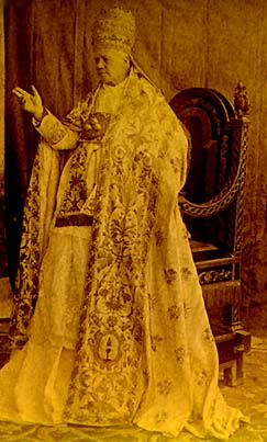 Pope Pius X, from a 1904 Stereopticon card